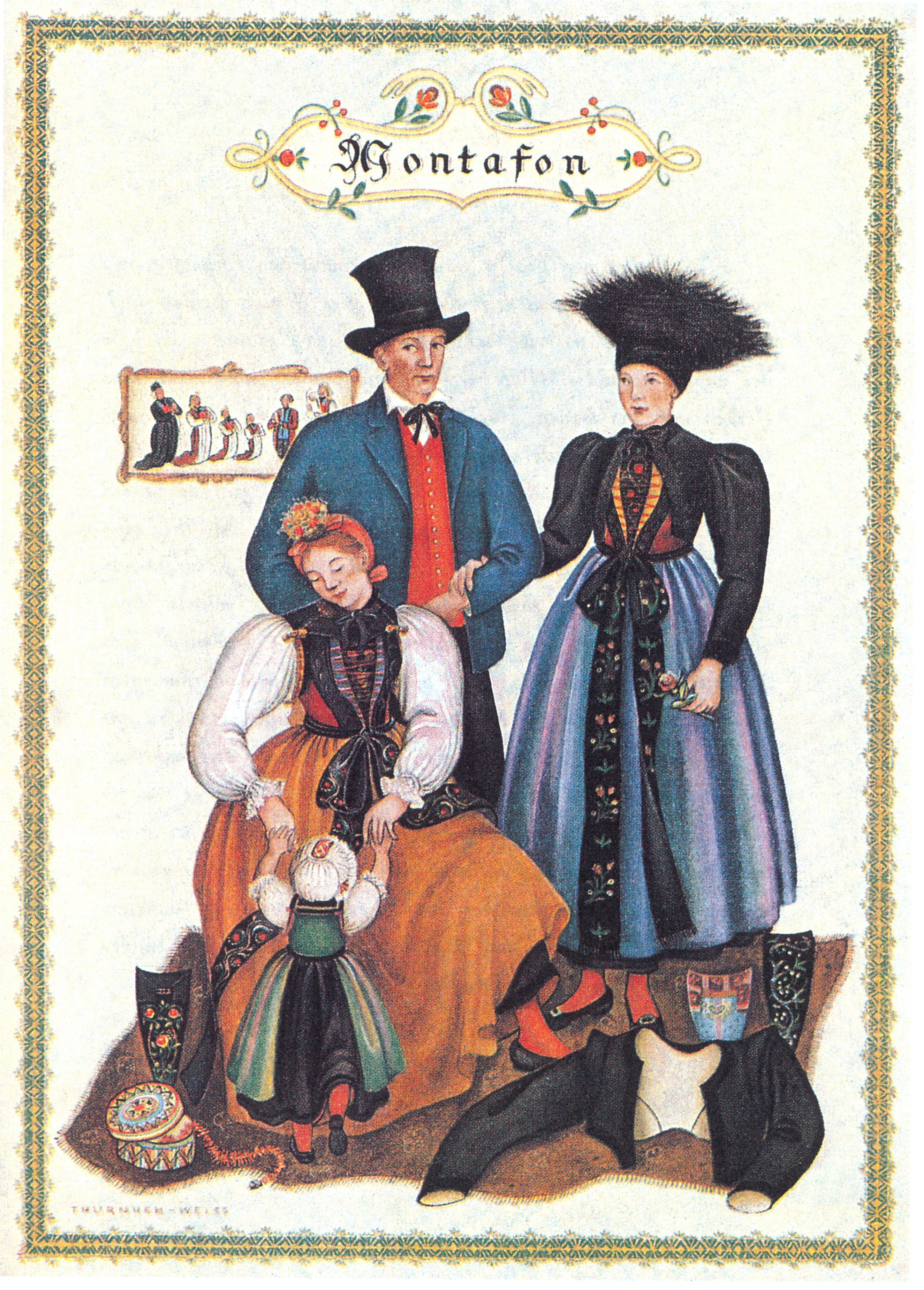 Trachtenbild 1 des Montafones von Lisl Thurnher-Weiß, Trachten in Vorarlberg (9Farbtafeln) , Reproduktion nach Originalen im Vorarlberger Landesmuseum, 1957. Scan aus der Vorarlberger Trachtenmappe (Bregenz 1984).